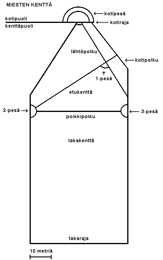 Miesten pesäpallokenttä